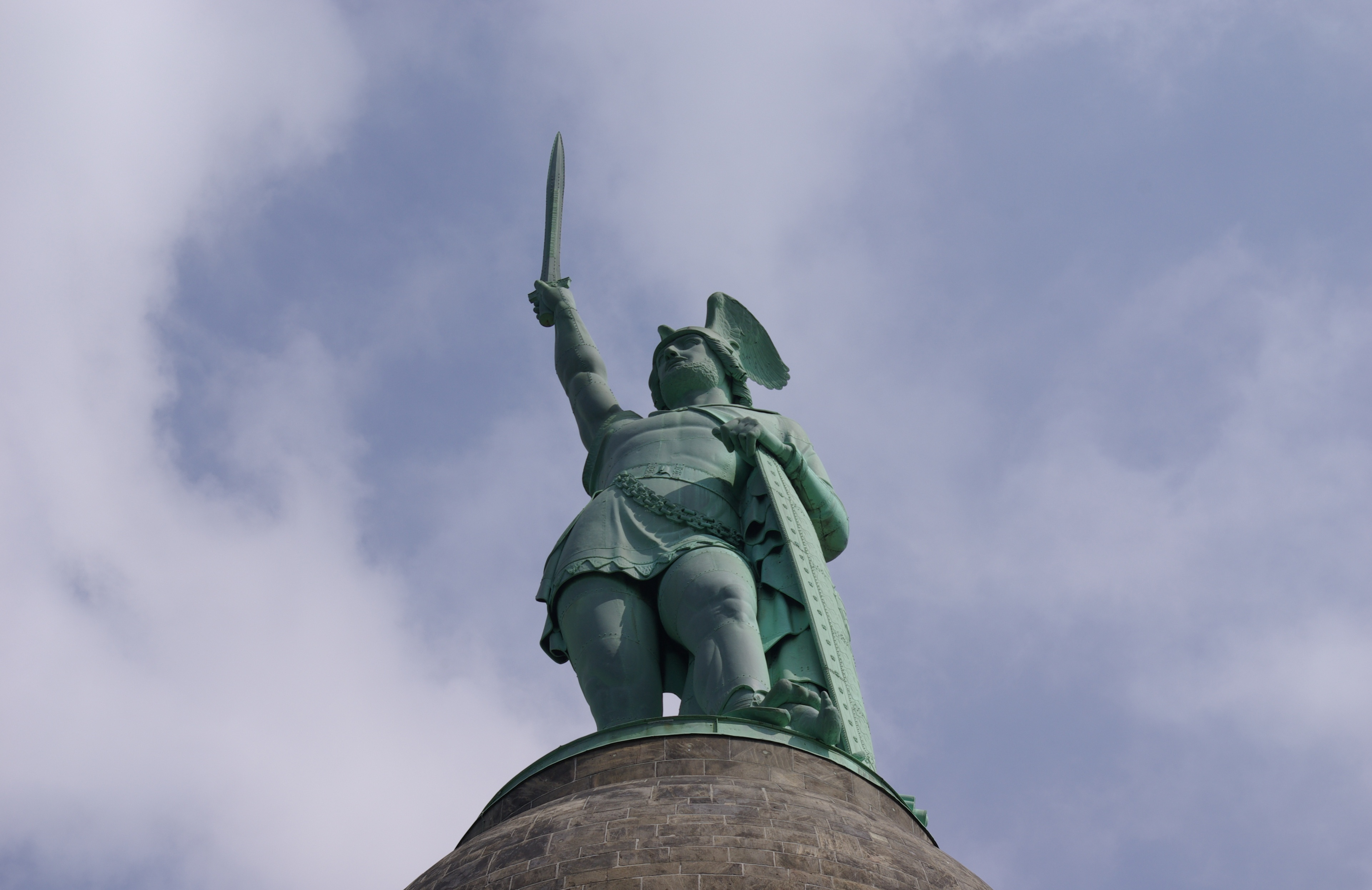 Hermannsdenkmal